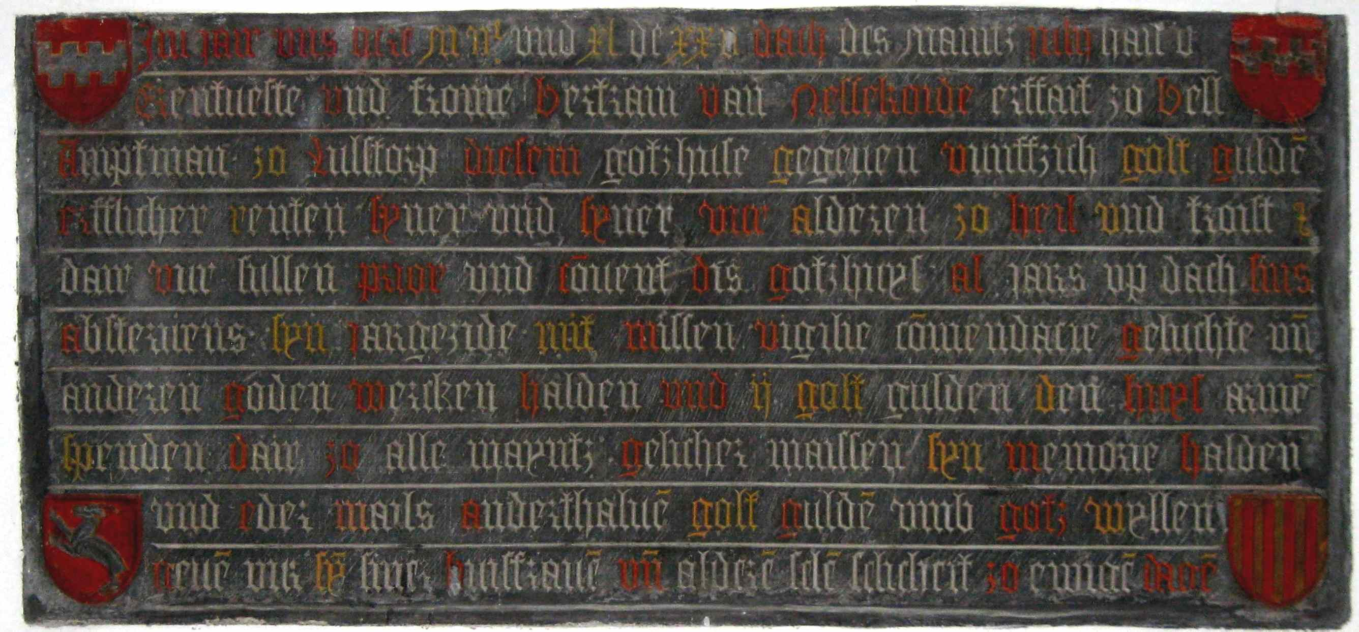 Inschrifttafel Bertrams von Nesselrode